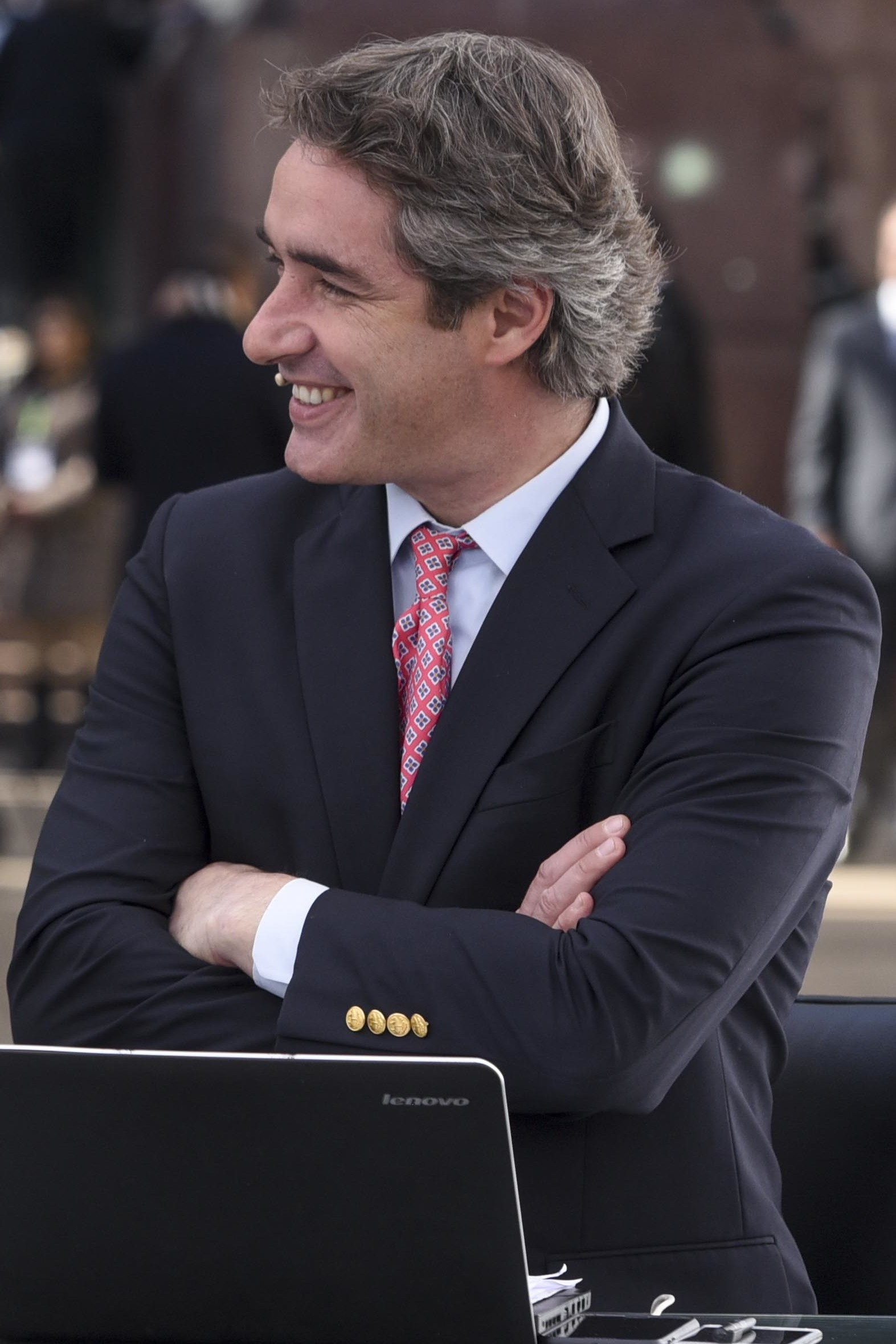 Ministra Paula Narváez asiste a la Cuenta Pública 2017 de la Presidenta Michelle Bachelet